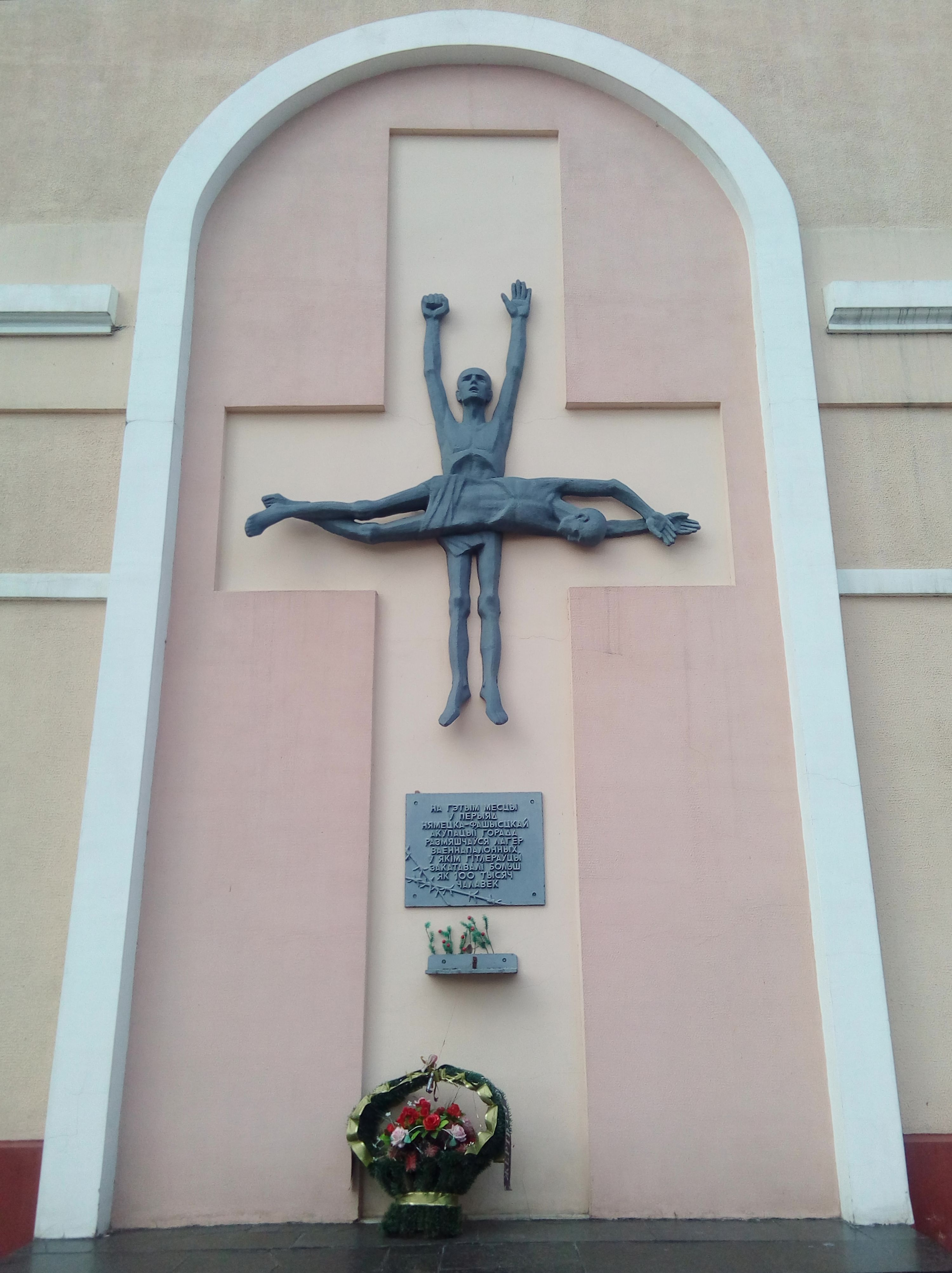 Мемориальный знак на месте Дулага-121